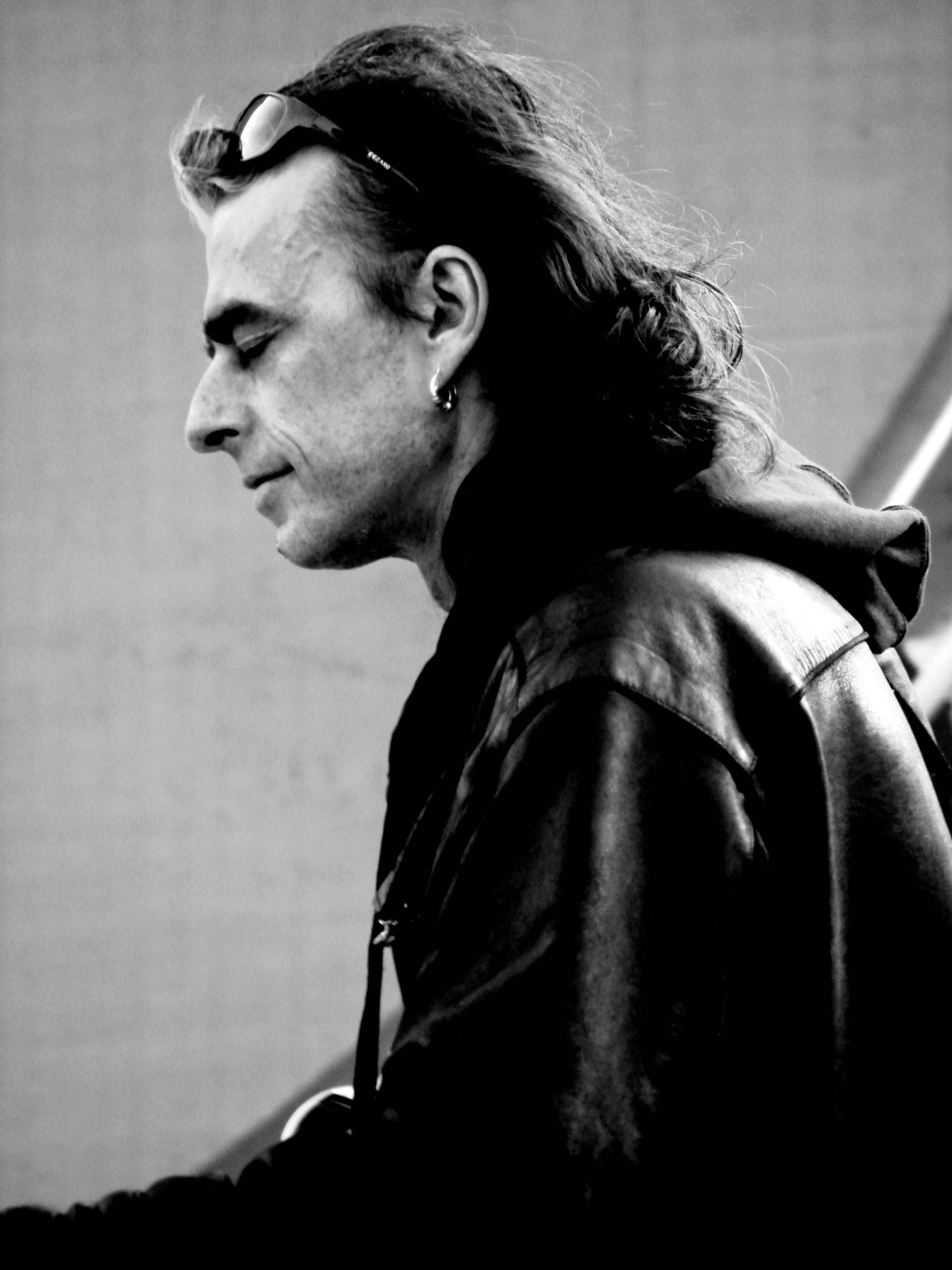 Adam Kulisz – polski wokalista, gitarzysta, harmonijkarz, kompozytor, autor tekstów.